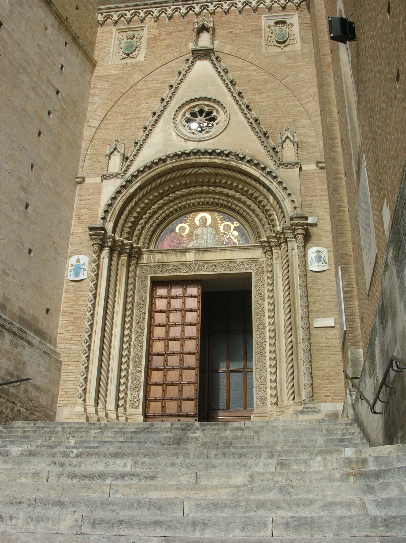 Autore: Fabio Apollonio Portale della cattedrale di San Giustino, Chieti. Categoria:Immagini di Chieti